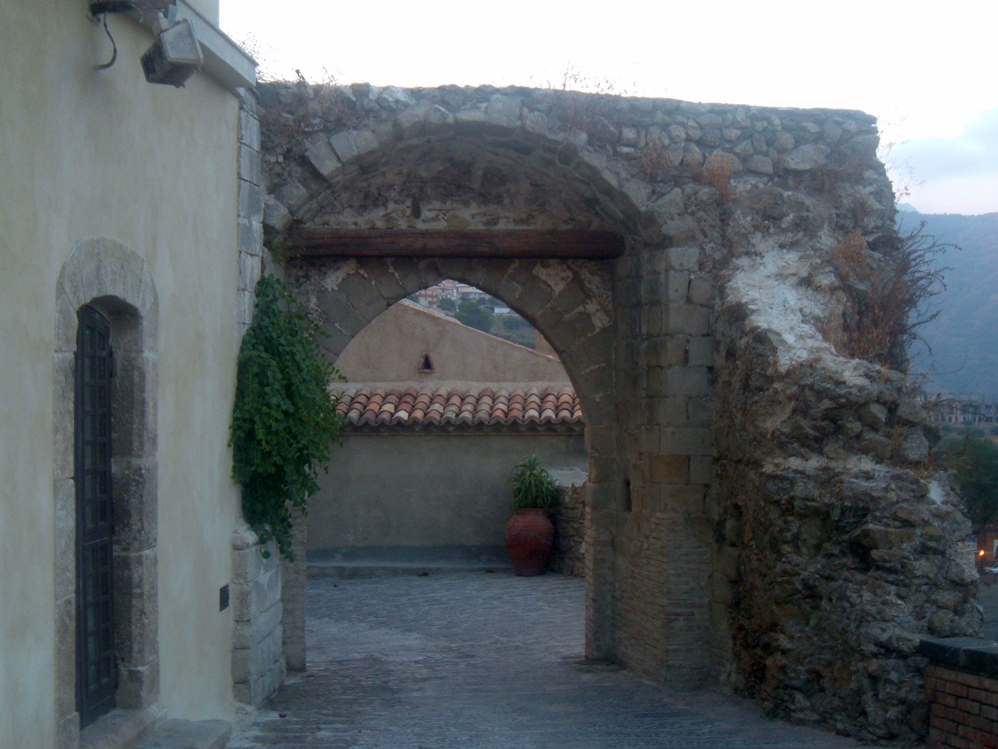 Via San Michele Savoca